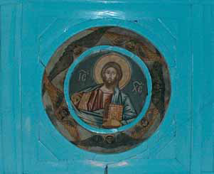 Исус Христос Вседържител от църквата "Успение Богородично" в Купа, Егейска Македония, Гърция.